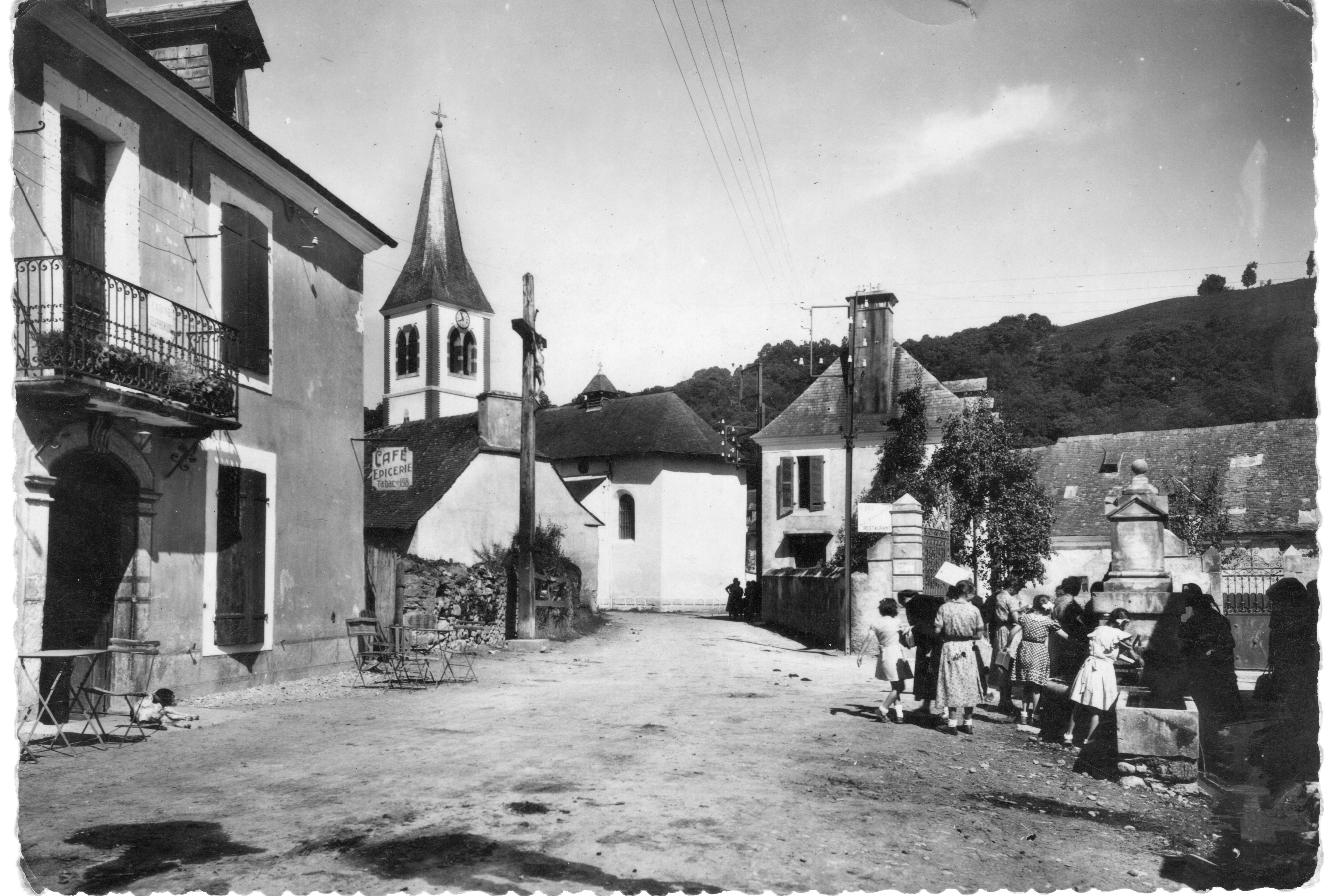 Centre du village dans les années 1940. Café-Epicerie "Chez Maximin" à la maison Bergerot, d'après une carte postale de l'époque